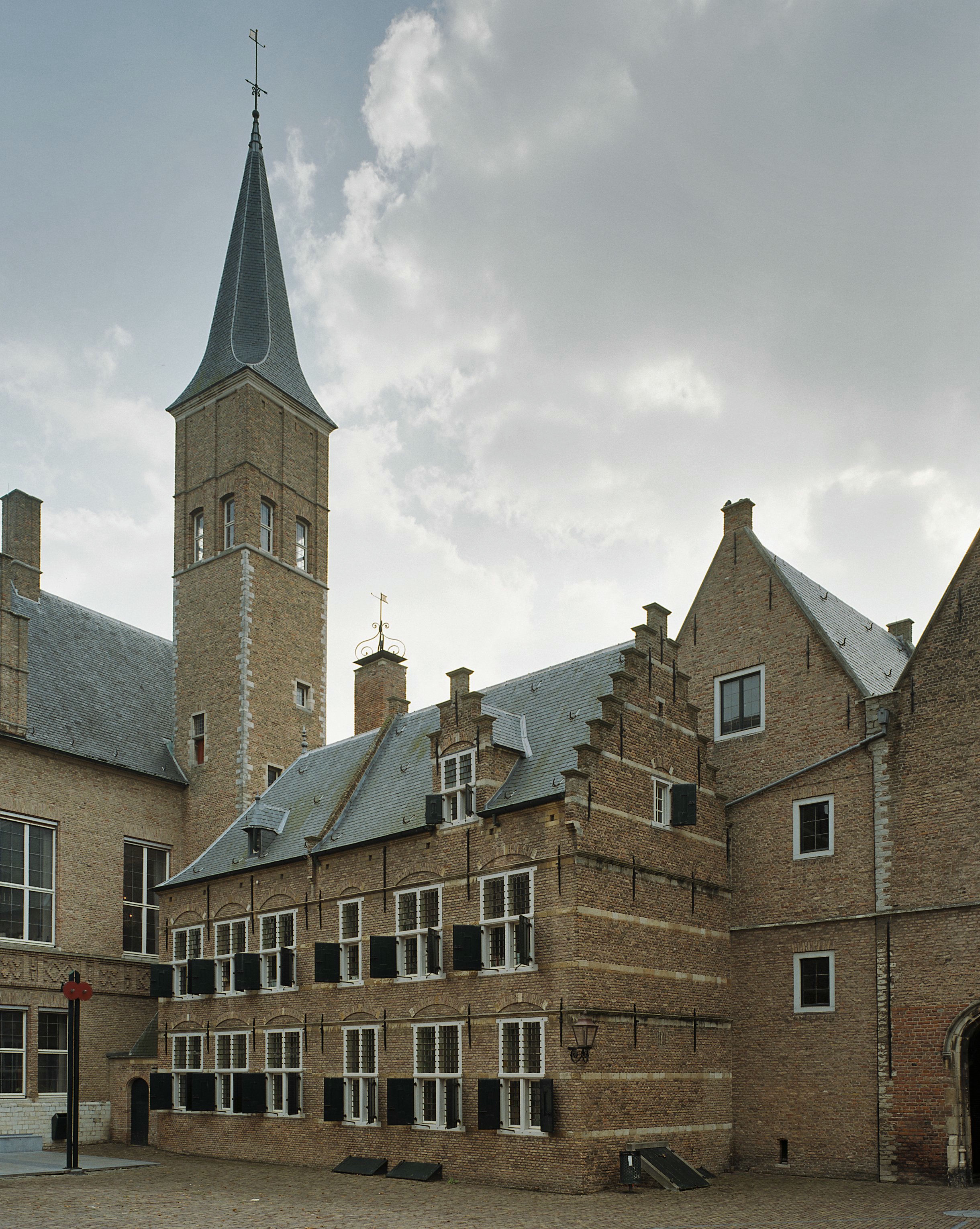 Abdijcomplex: Overzicht plein This is a possible Rijksmonument: Find the monument in the Monuments database: Abdij in Middelburg All Rijksmonumenten in Middelburg Is this a Rijksmonument? Yes No More information about this project and help. More images to work at in Category:Possible Rijksmonumenten.